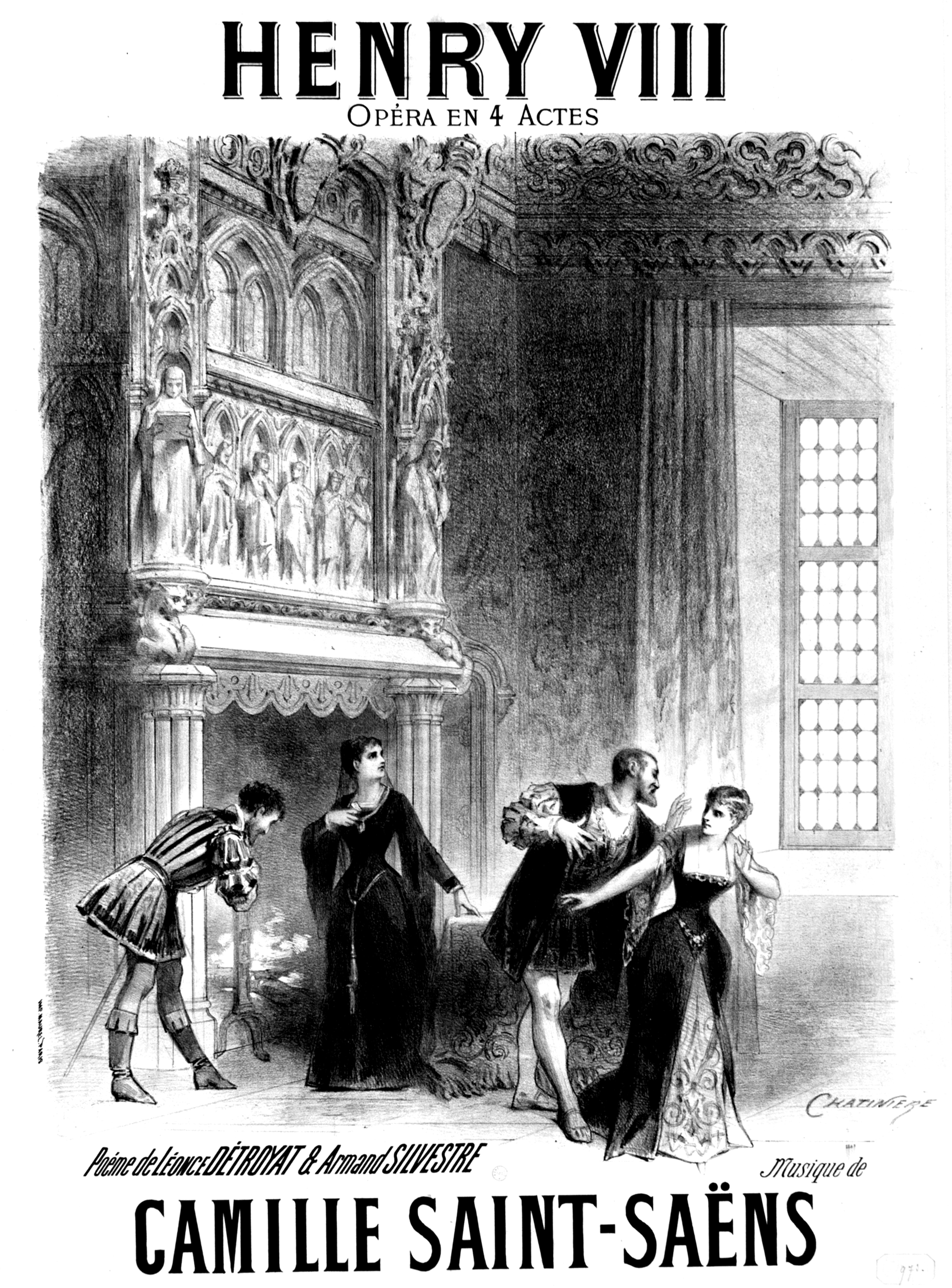 Saint-Saëns - Henry VIII - Illustration - Chatinière 1883